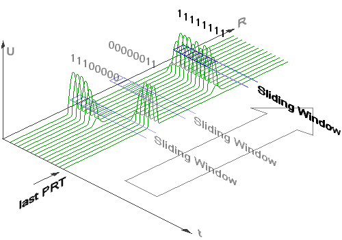 Anwendung des Sliding Window Verfahrens bei einem Radargerät: Es werden hier acht Impulsfolgeperioden betrachtet. Das Sliding Window prüft, ob (hier) in allen acht Perioden ein auswertbares Echosignal vorhanden ist. Wenn ja, dann ist diese Position die gemessene Koordinate des Ziezeichens.